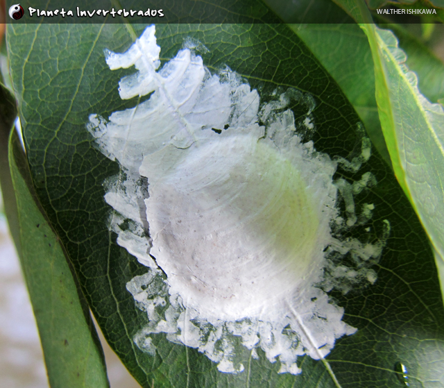 Ovos de Megaloptera: Corydalidae